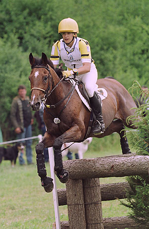 Marie-Jeanette Steinle (Marie-Jeanette Ferch) auf Traque le Vent Foto: Julia Rau